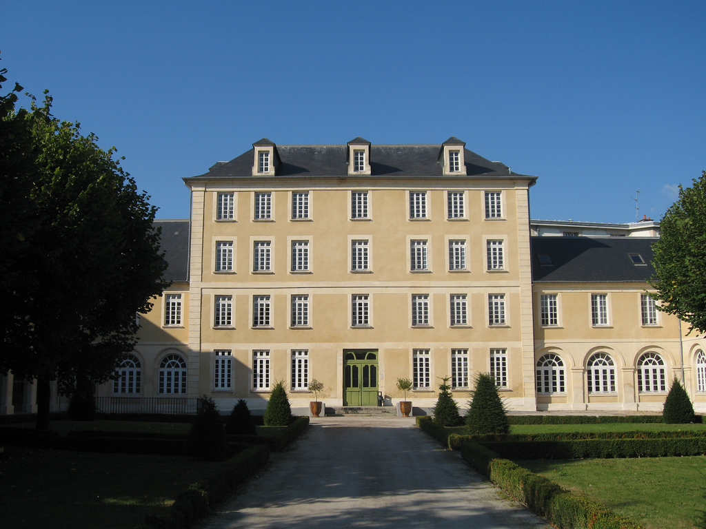 Ancien pavillon Saint-Charles (pavillon des hommes), aujourd'hui utilisée par la DRAC